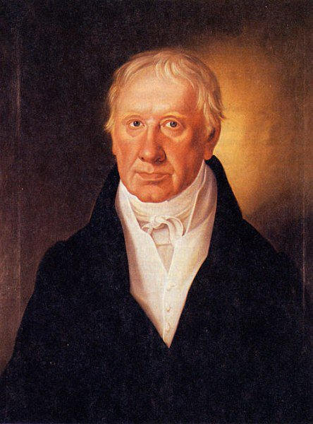 Portrait des Arztes und Botanikers David Heinrich Hoppe (1760-1846)